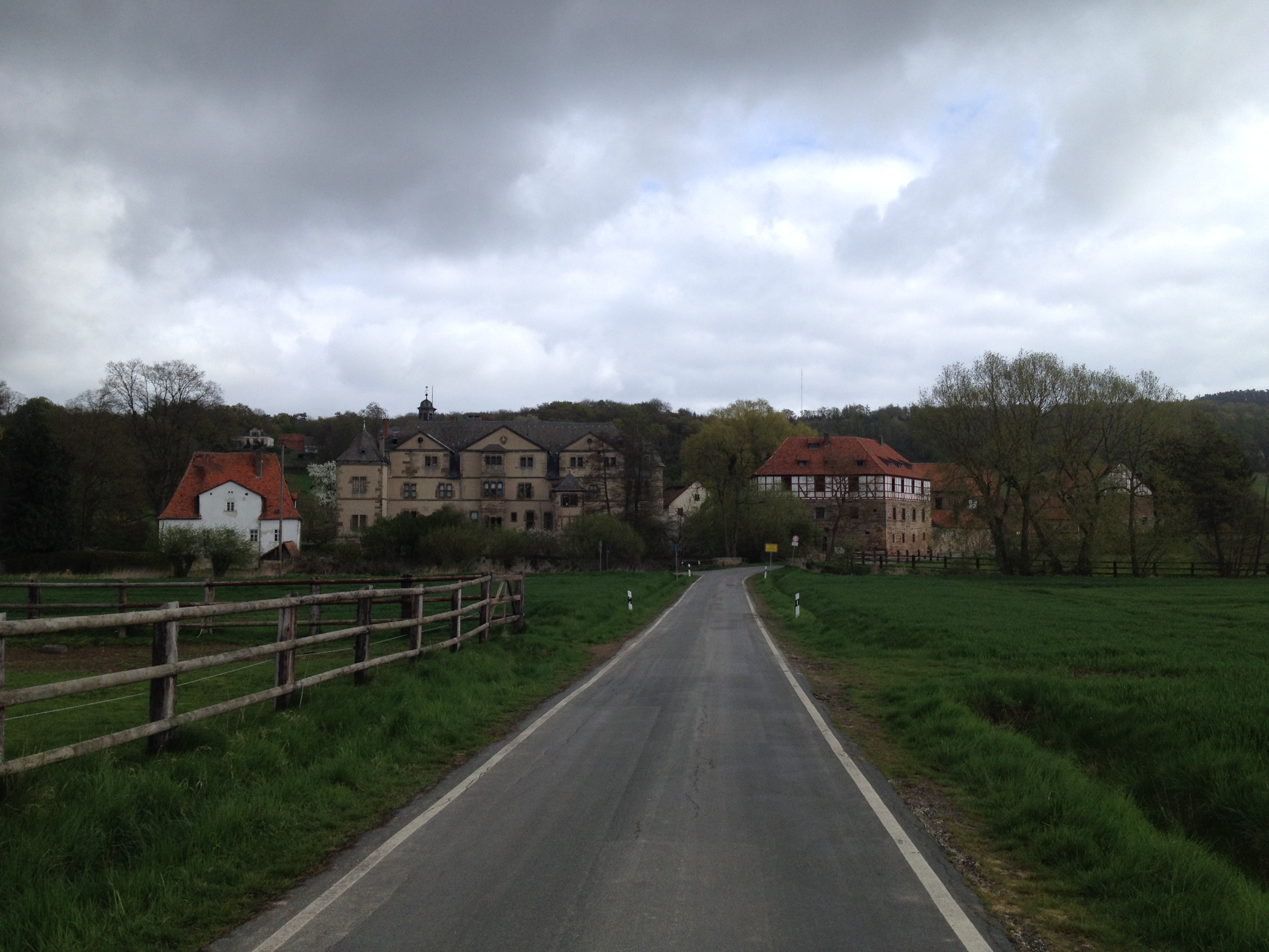 Der Eco Pfad Kulturgeschichte Wolfhagen zwischen den Stationen Wüstung Langel und Wasserschloss Elmarshausen auf der Landsberger Straße (K 94), mit Blick auf das Wasserschloss Elmarshausen (beiges Gebäude links)